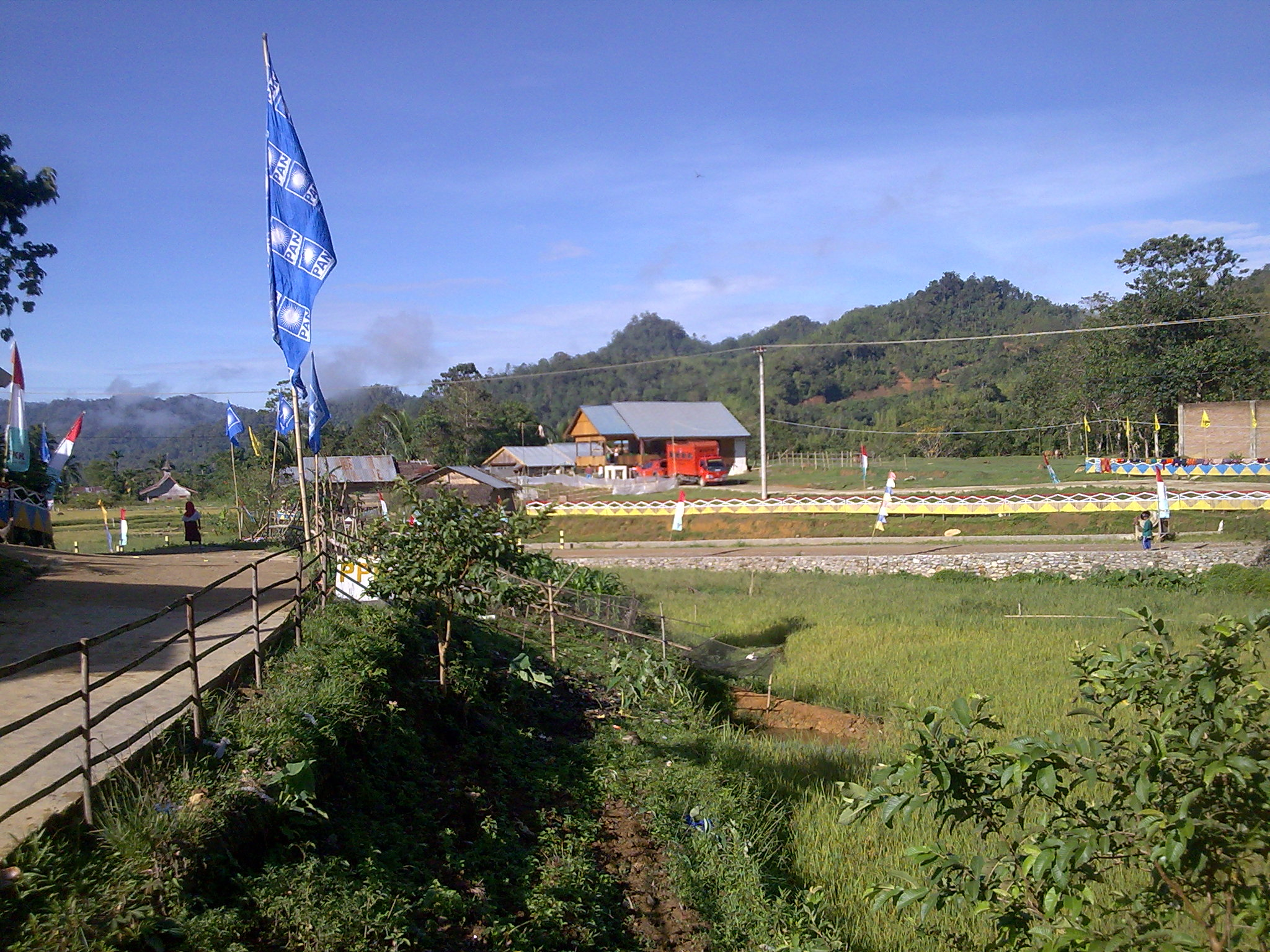 Aralle, Mamasa Regency, West Sulawesi, Indonesia